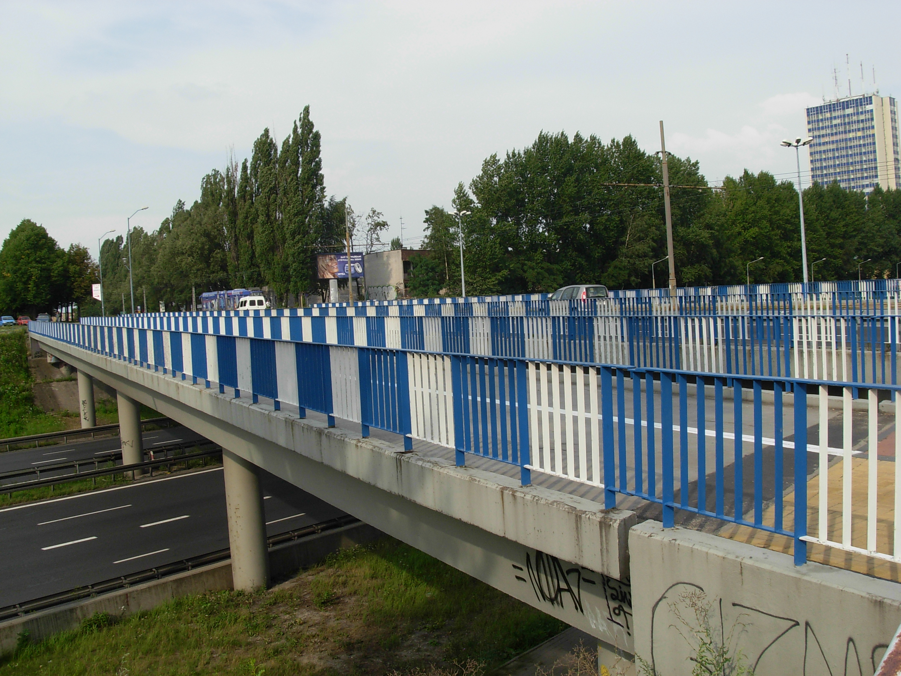 Katowice